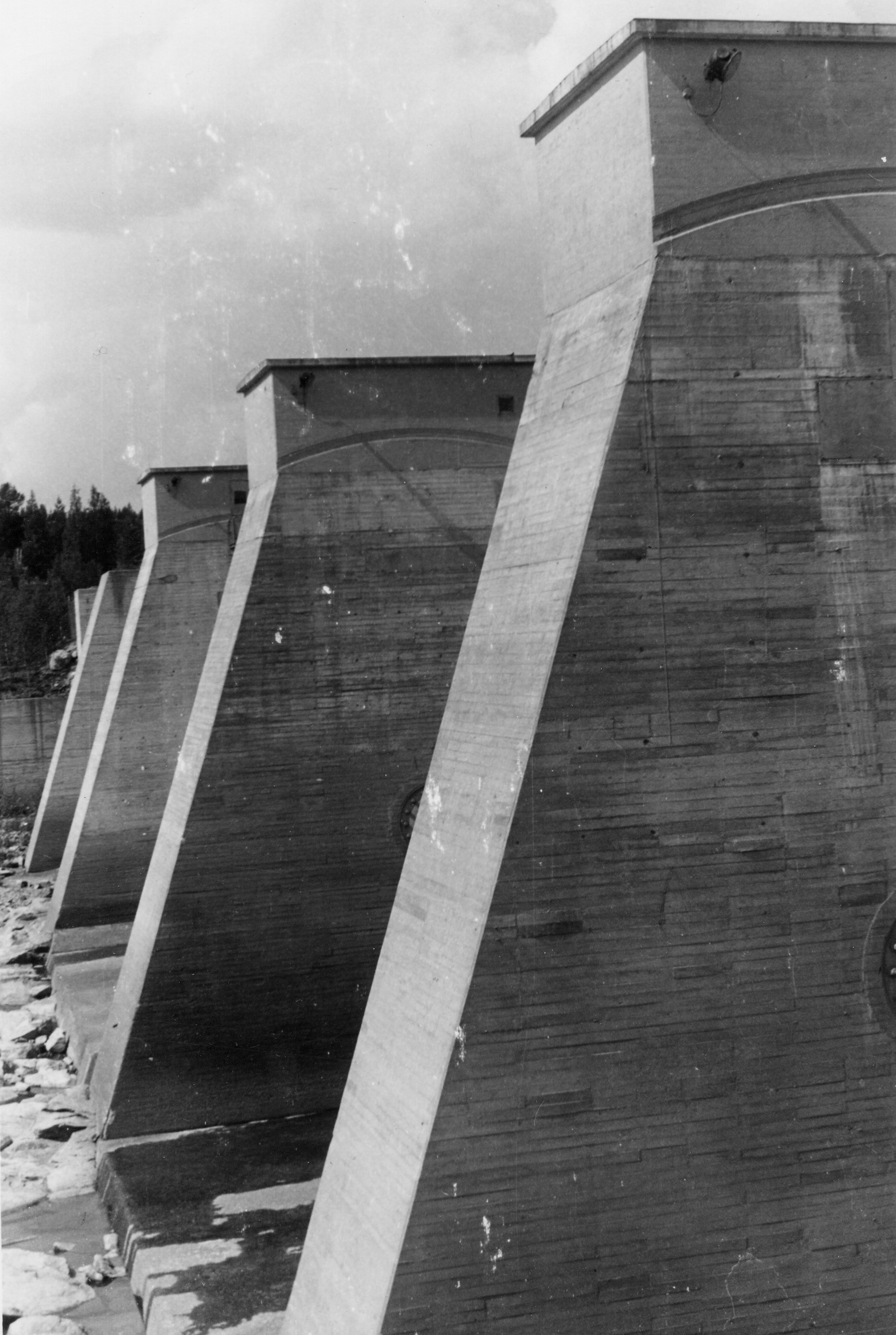 Sluseport, Harsprånget, Stora Lule älv